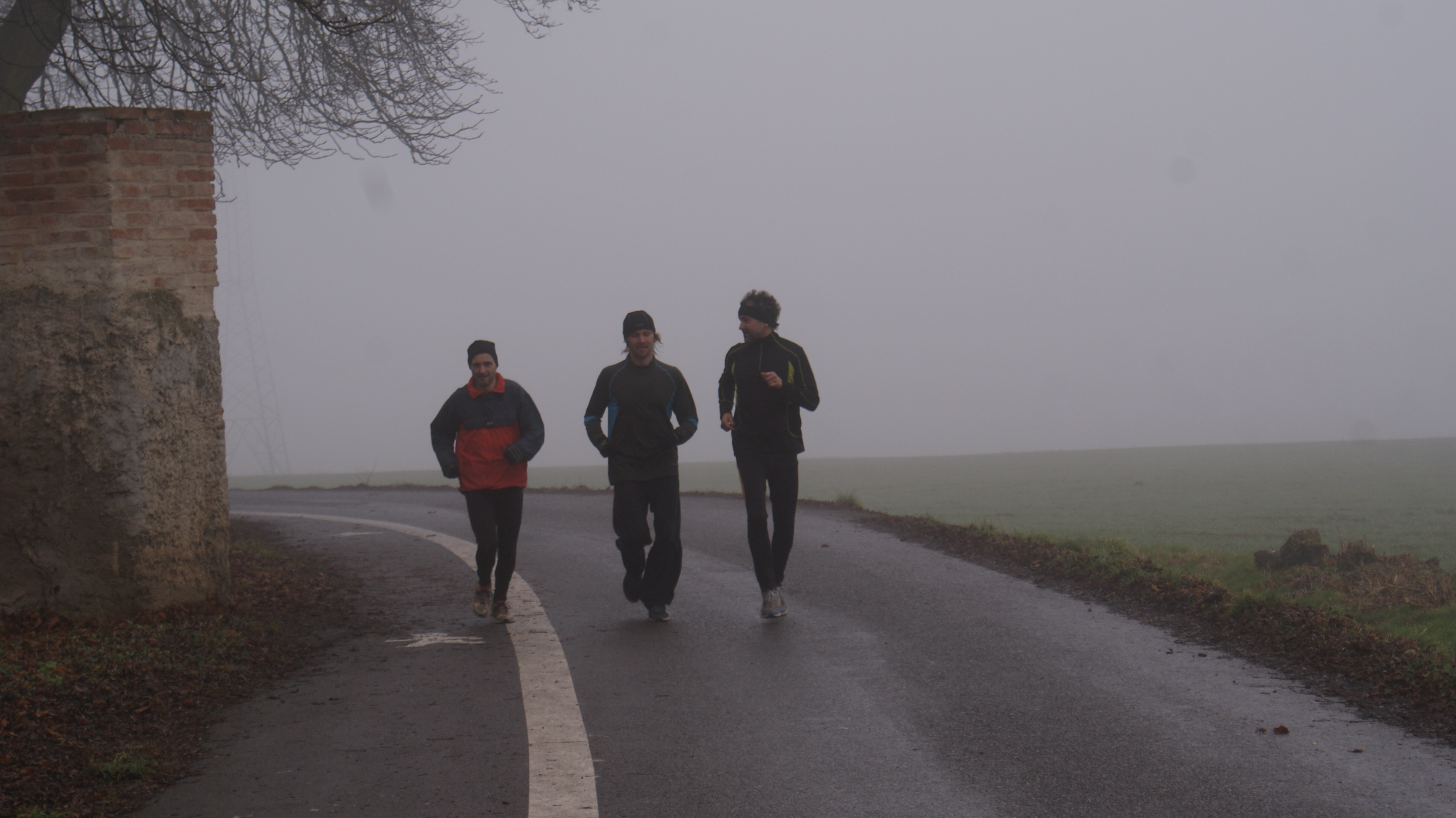 Zimní běh Litní - v cílové rovině 18. 1. 2014